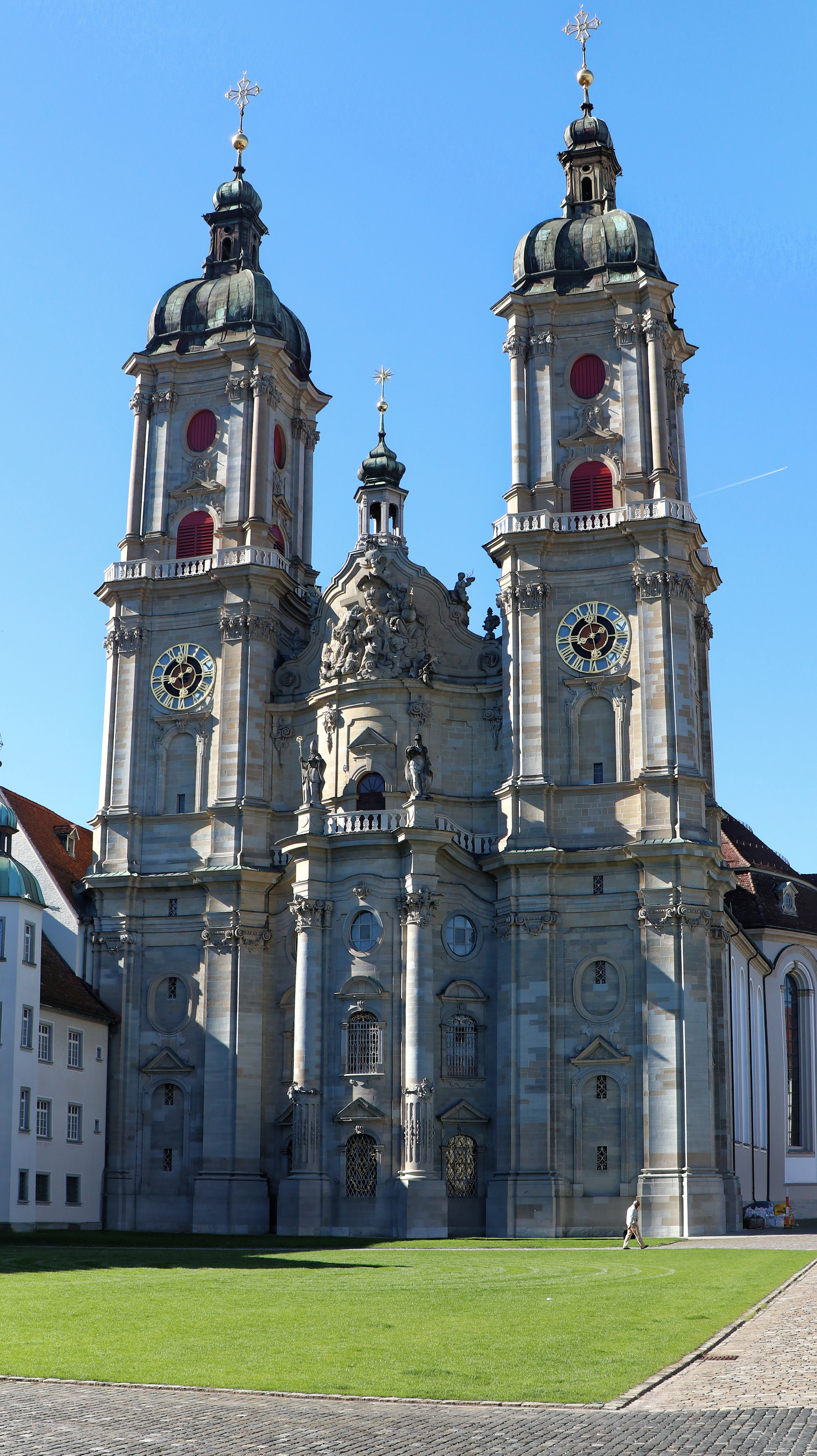 Stiftskirche und Klosteranlage von außen